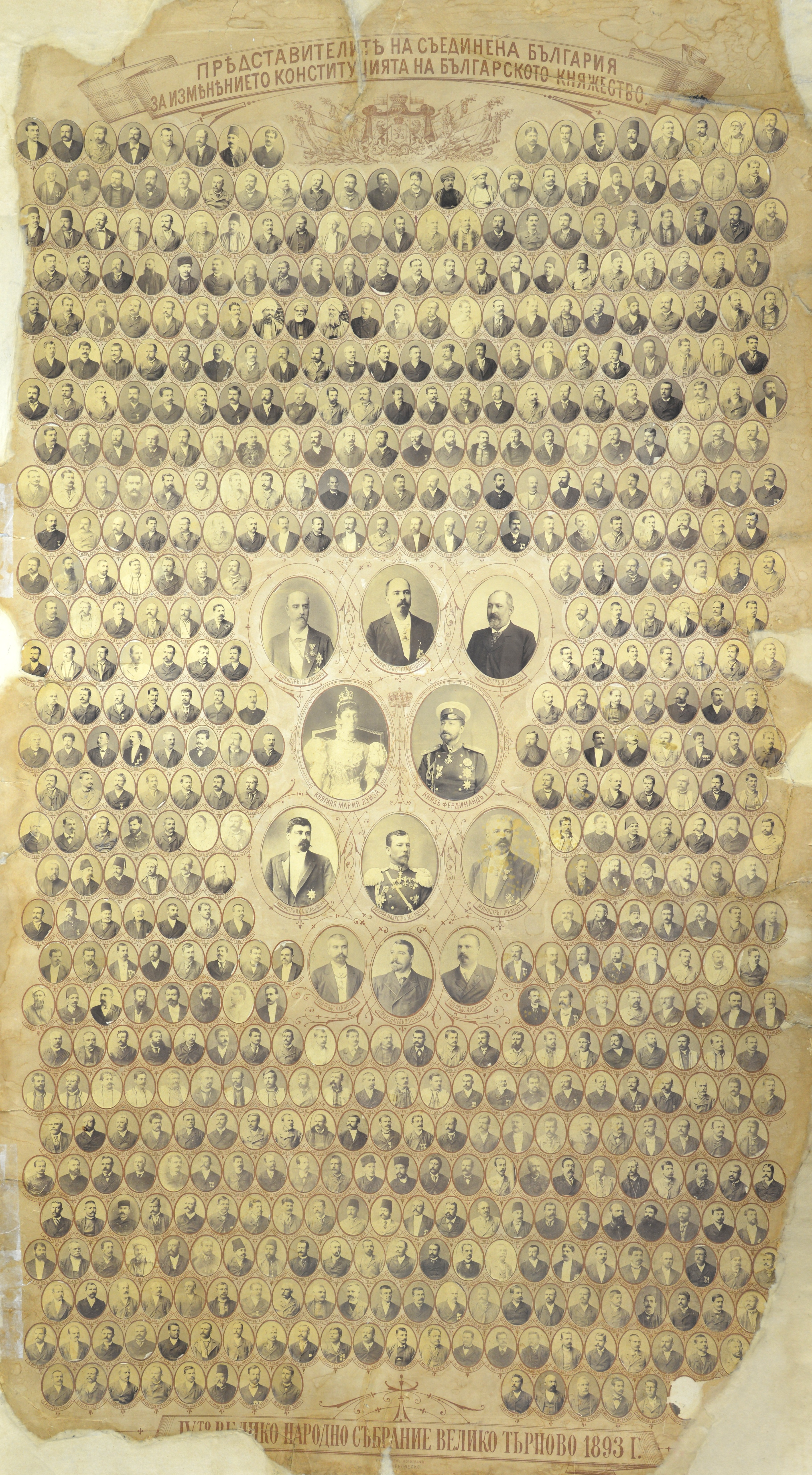 Представителите на съединена България за изменение на конституцията на Княжество България. ІV ВНС във Велико Търново.